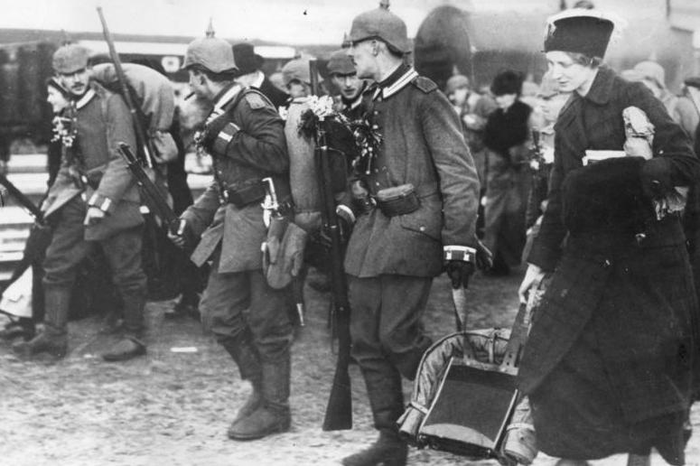 ADN-ZB I. Weltkrieg 1914-1918 Mobilmachung in Berlin, Soldaten werden von ihren Angehörigen zur Front verabschiedet.